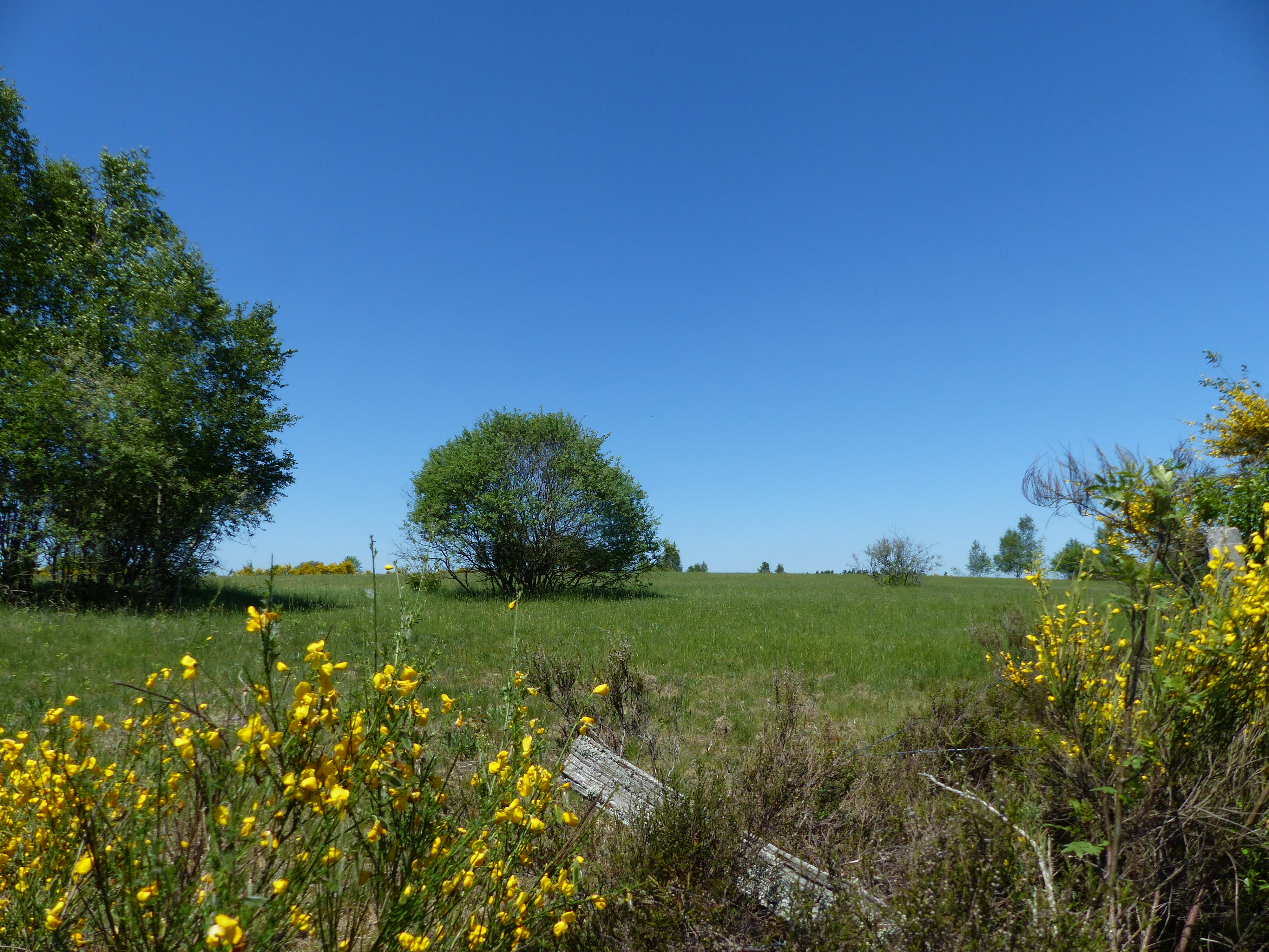 Sommerliche Ginsterblüte bei Siegen Trupbach.